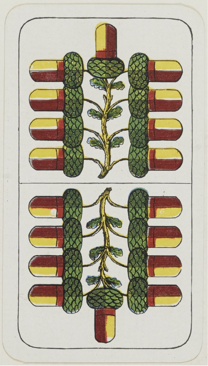 Dziewiątka żołędna z wzoru wuntemburskiego